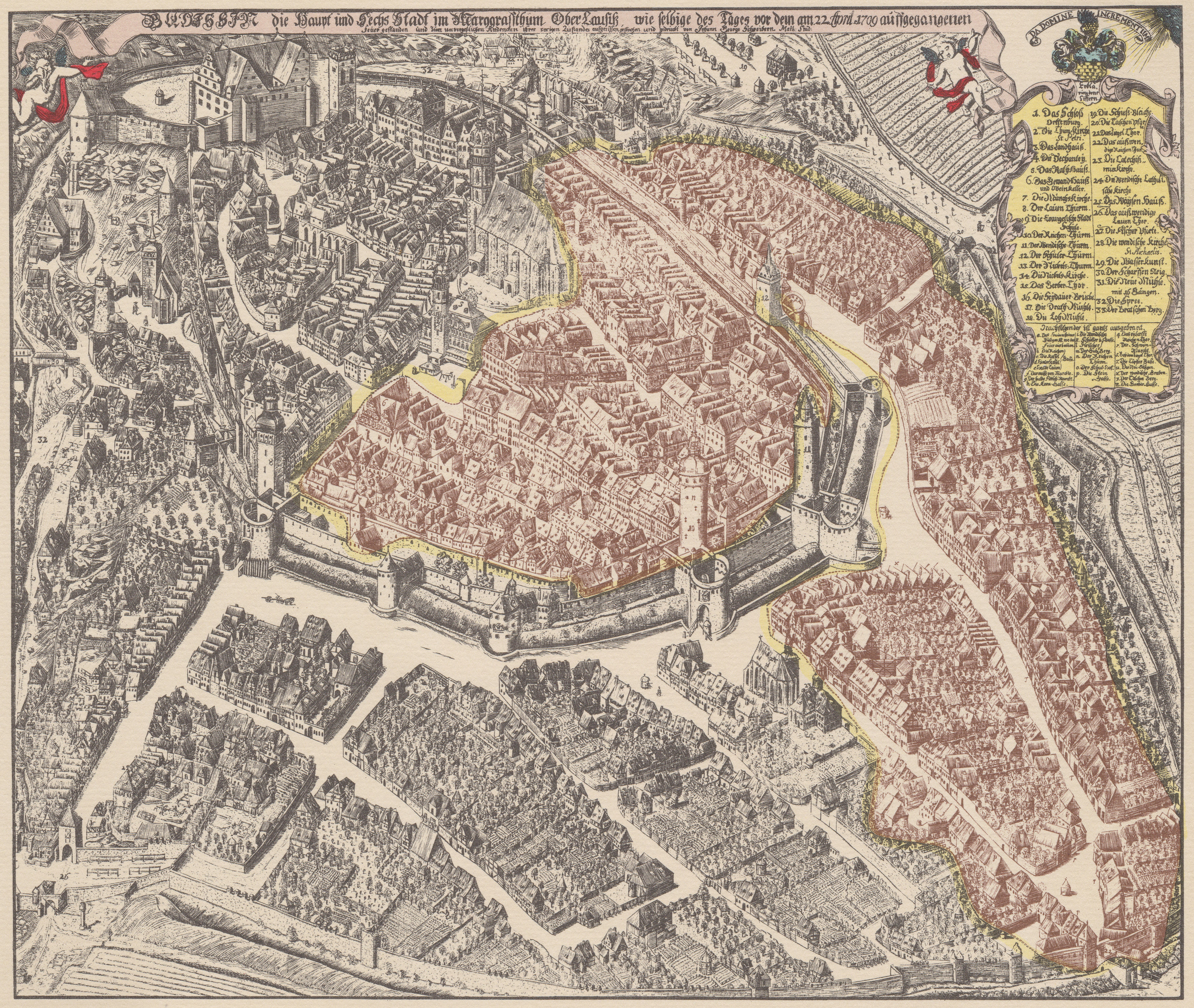 Plan von Bautzen im Jahr 1709. Rot gekennzeichnet die vom Brand am 22. April 1709 zerstörten Teile der Stadt. Hornjoserbsce: Plan Budyšina z lěta 1709. Čerwjene su přez woheń dnja 22. apryla 1709 zničene měšćanske dźěle.